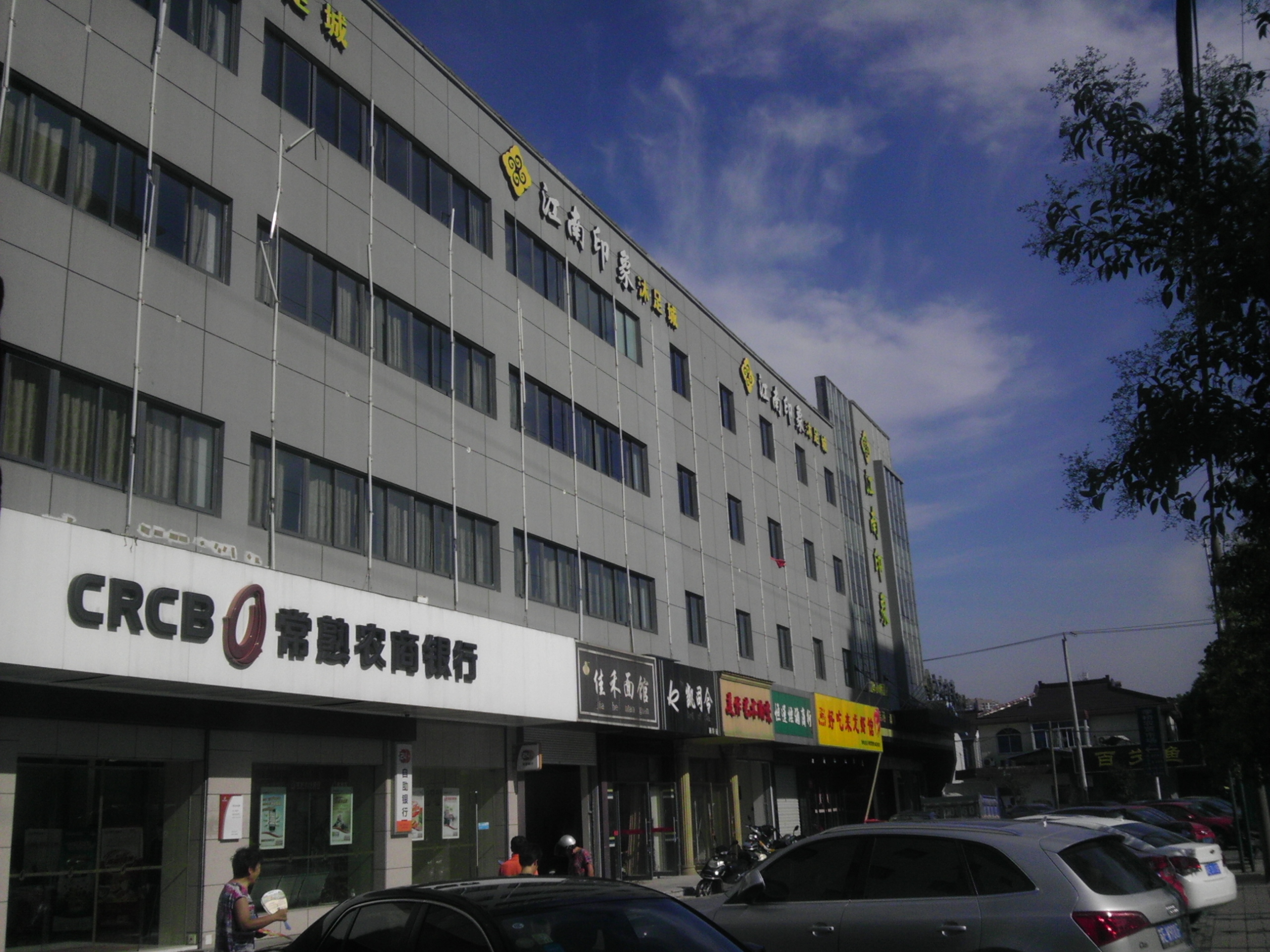 Changshu, Suzhou, Jiangsu, China